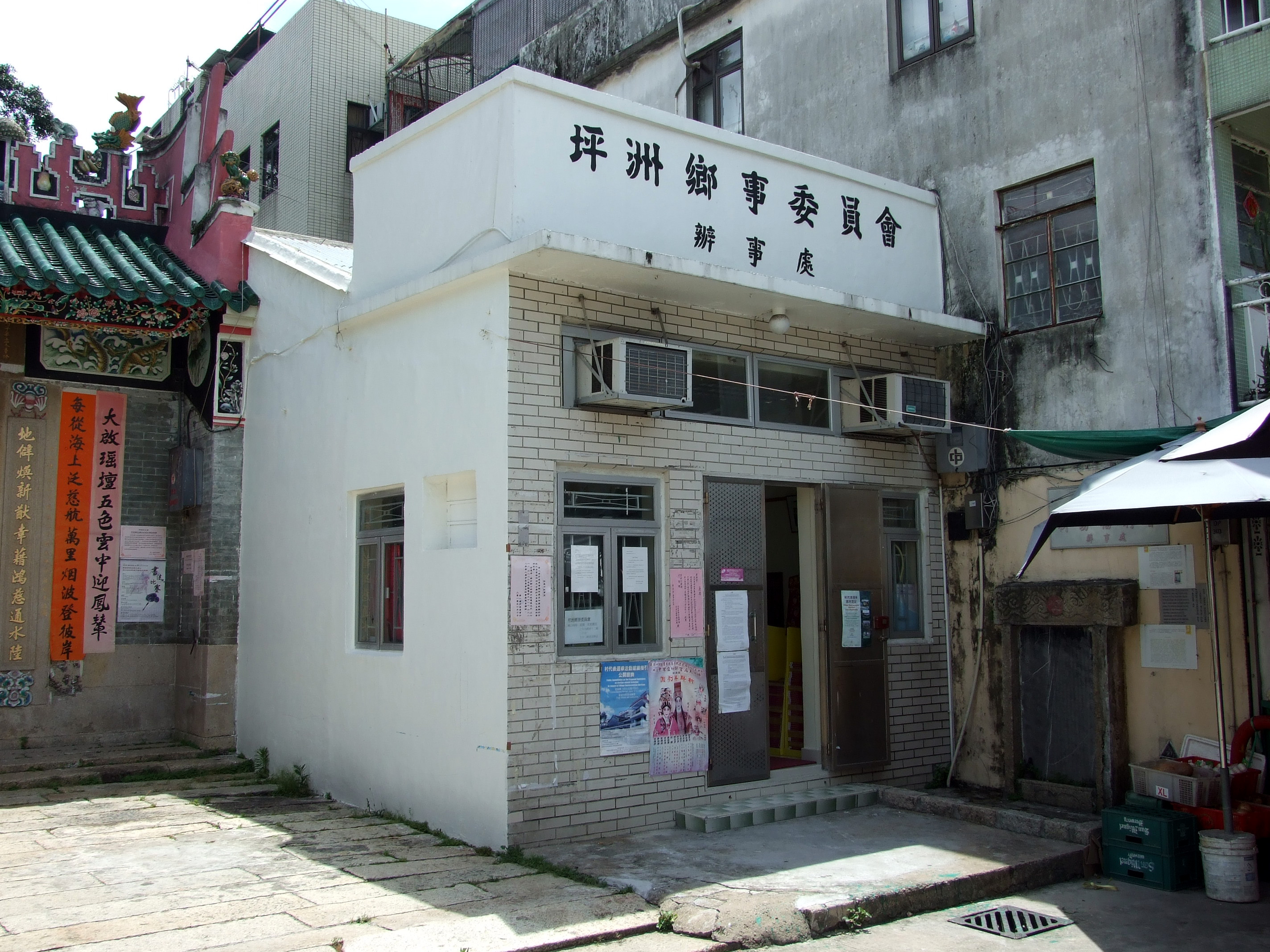 中文（香港）: 坪洲鄉事委員會